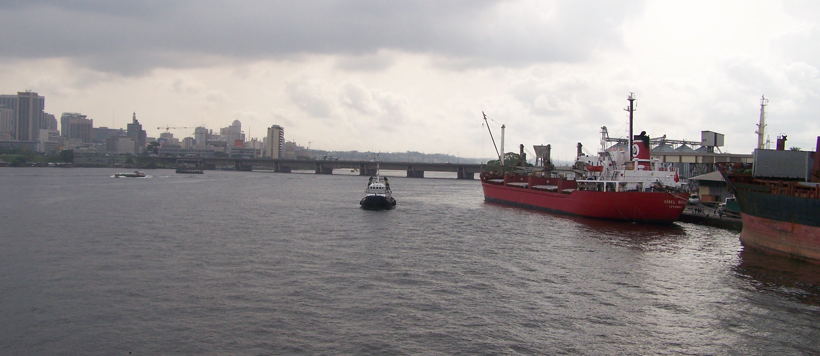 Dans le port d'Abidjan